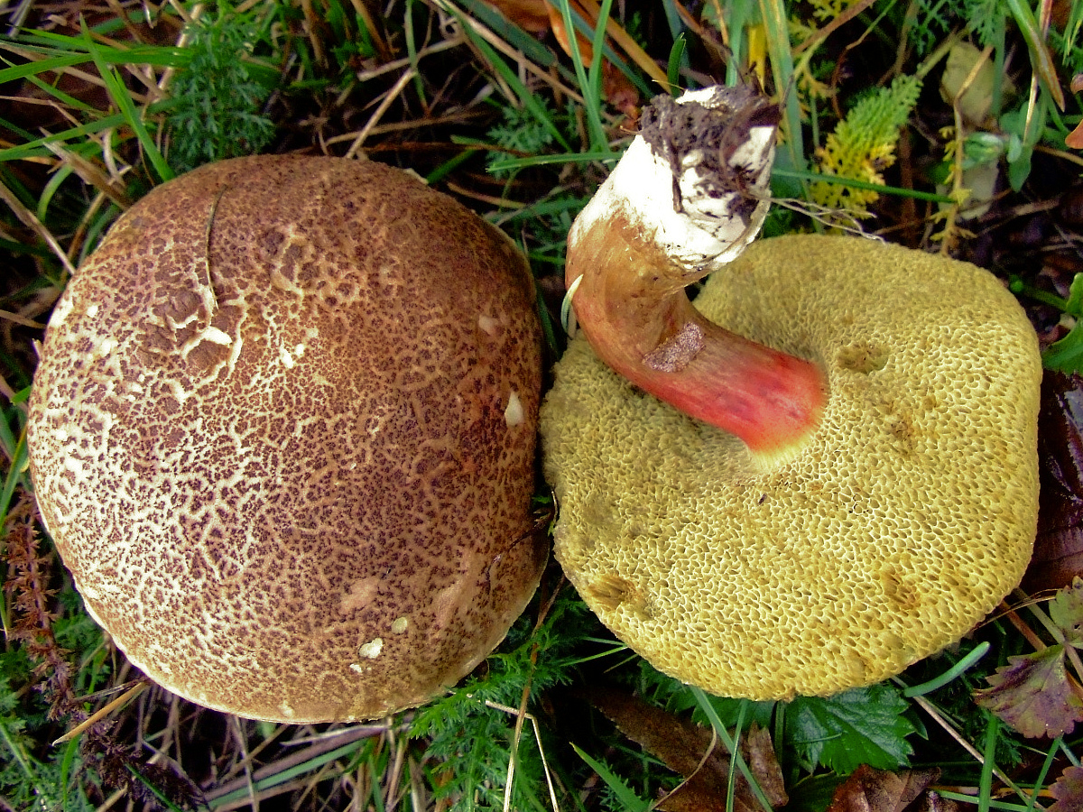 Xerocomus chrysenteron a1